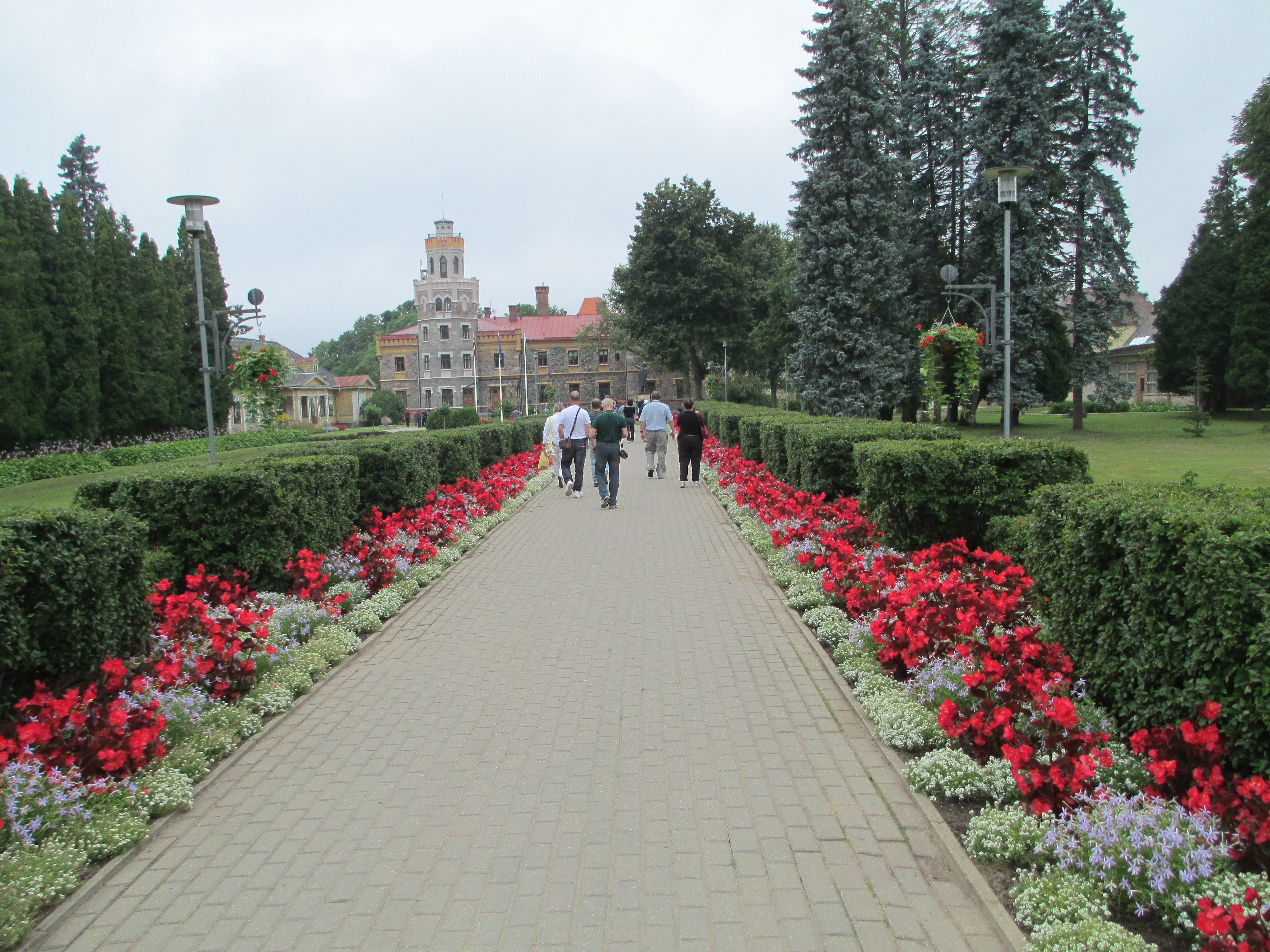 המצודה החדשה של סיגולדה בלטביה